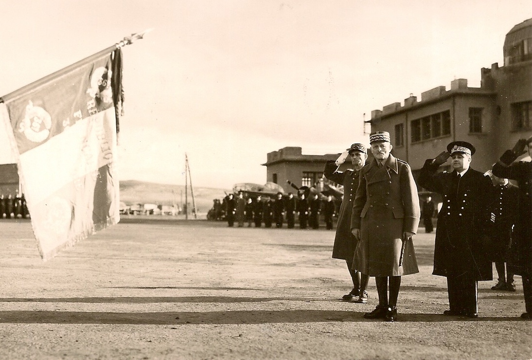 Inspection du Général Maxime Weygand à la BA de Sétit - Aïn-Arnat en 1940 avec le Gal Nogués et l'Amiral Abrial : salut aux couleurs